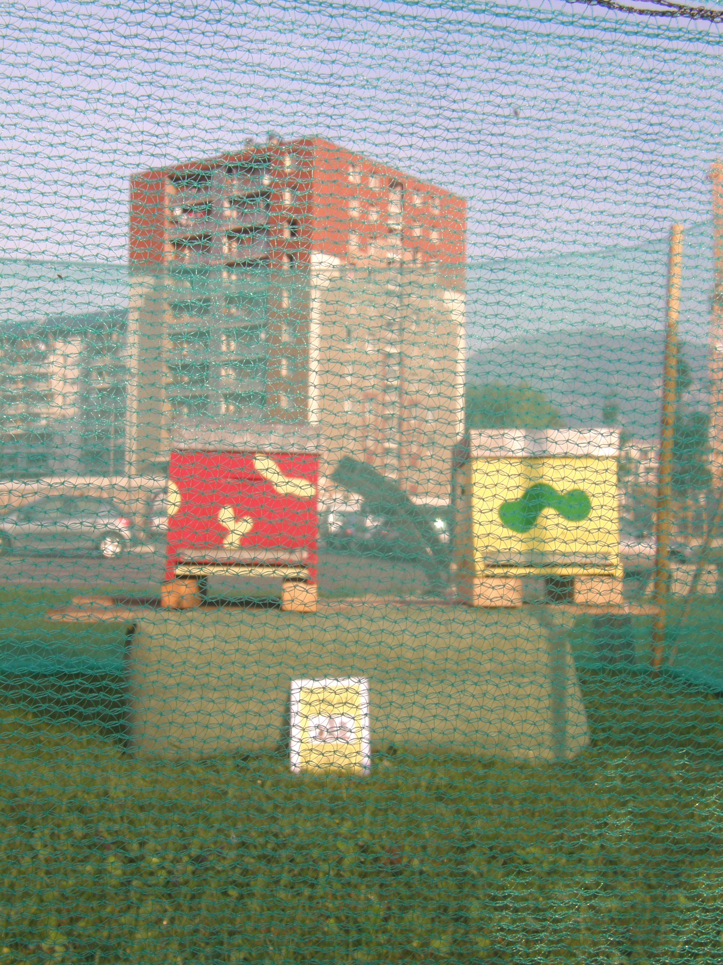 19 élèves en classe de 3ième passerelle, approchent l'apiculture grâce à un rucher de 8 colonies dans l'enceinte même de leur collège